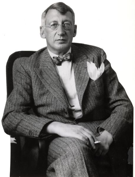 portrett, mann, reklamekonsulent, fjellklatrer, sittende halvfigur.